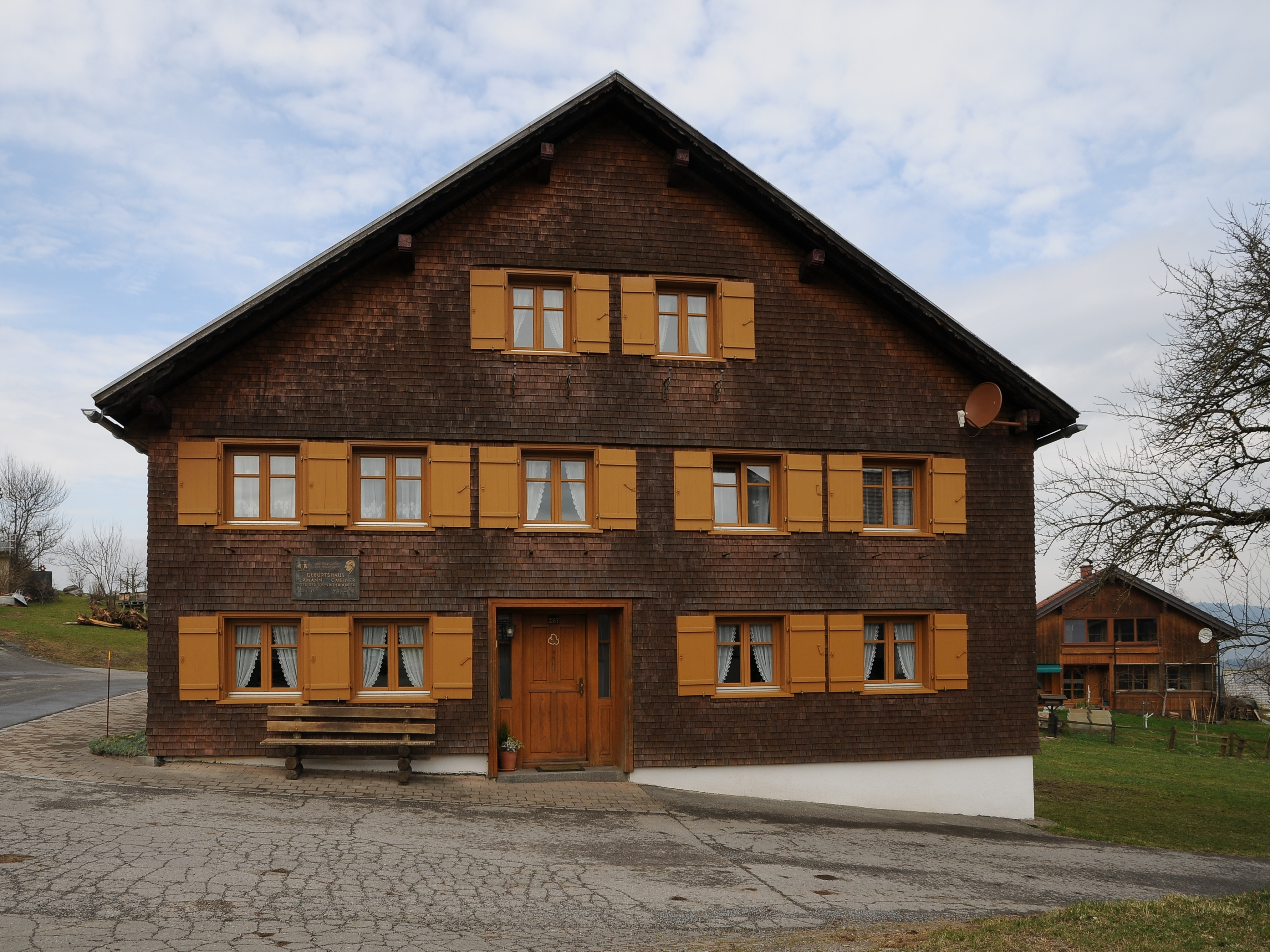 Das Geburtshaus von Hermann Gmeiner in Alberschwende im Bregenzerwald.